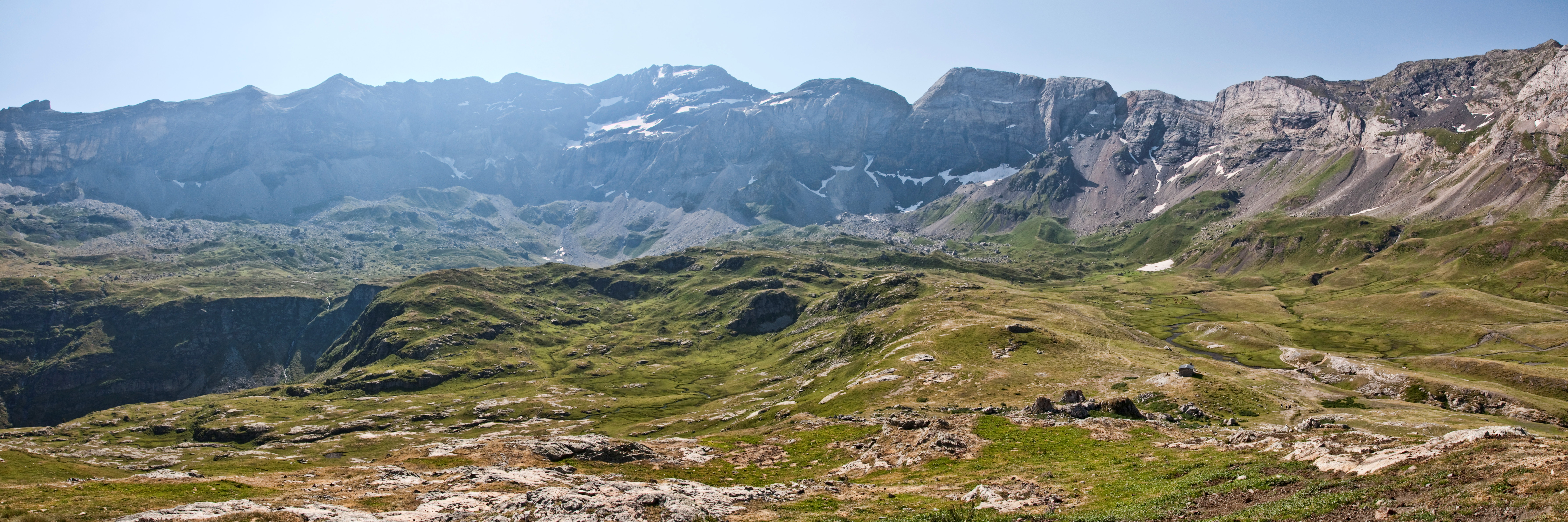 Panorama général Cirque de Troumouse (Pyrénées)